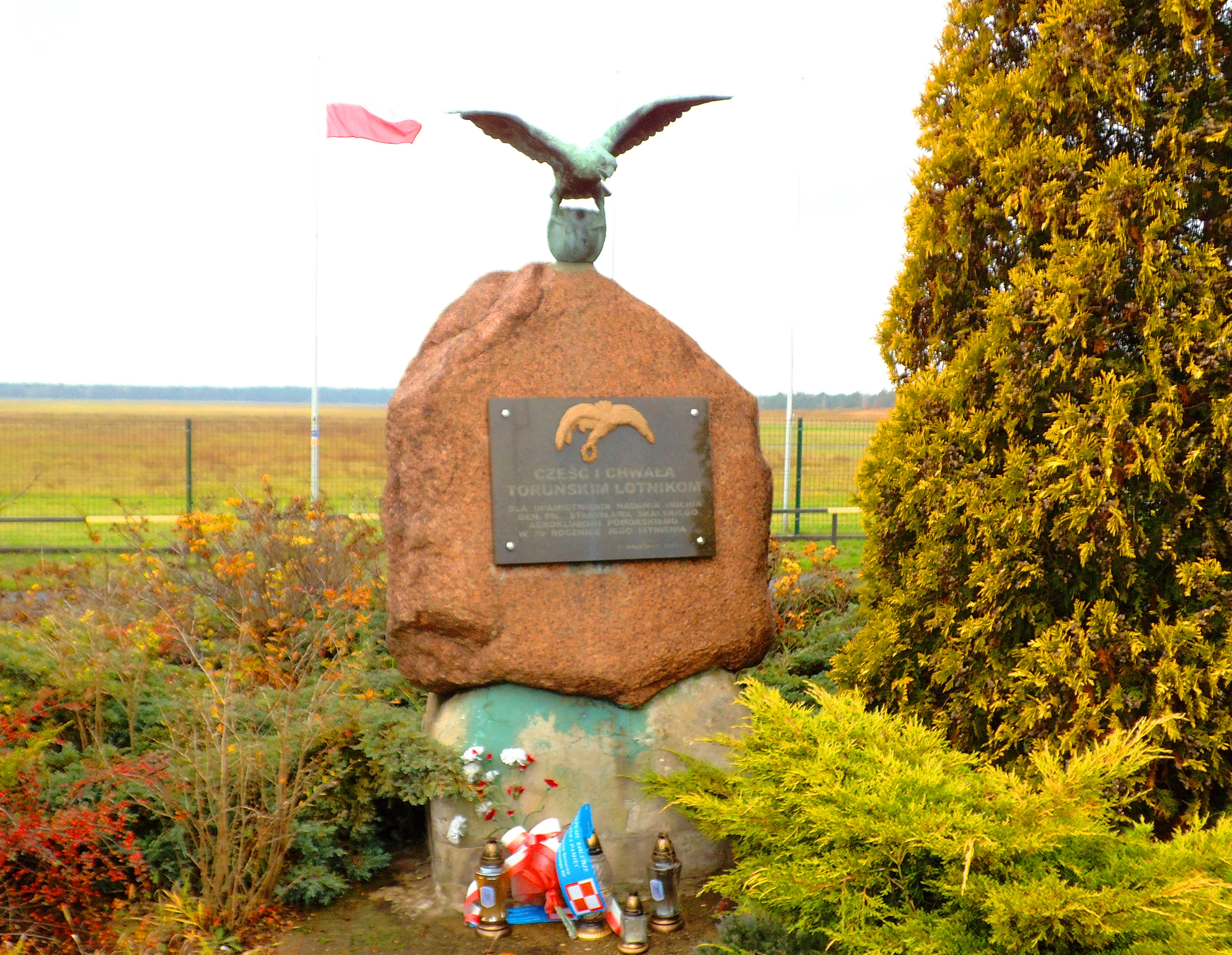 Pomnik Lotników Toruńskich